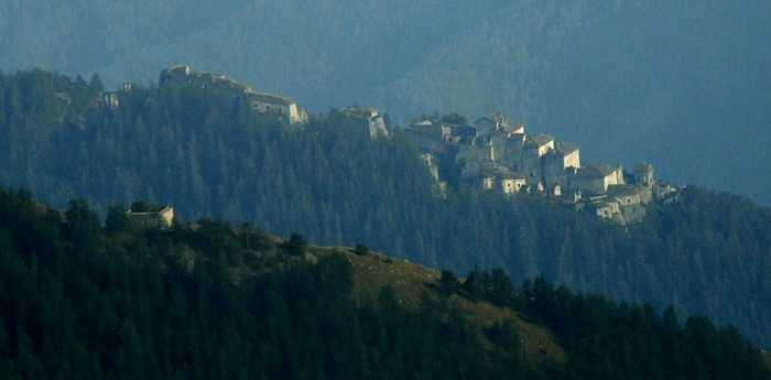 Fortezza di Fenestrelle seen from Colle delle Finestre Picture taken and edited by user Idefix september 2006